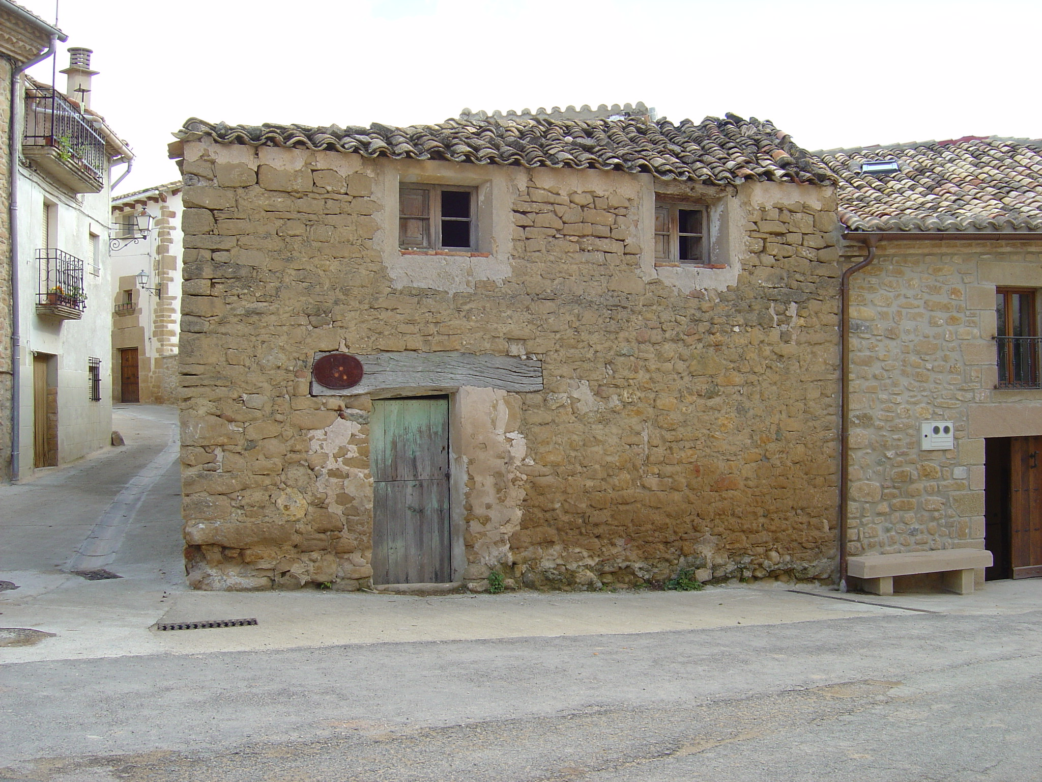 Casa de arquitectura popular en Ázqueta, Navarra.